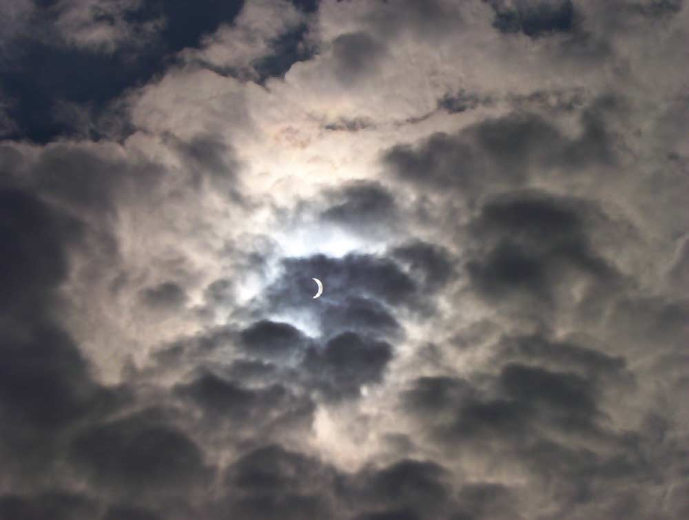 Затмение солнца в Саратове 29 марта 2006 года